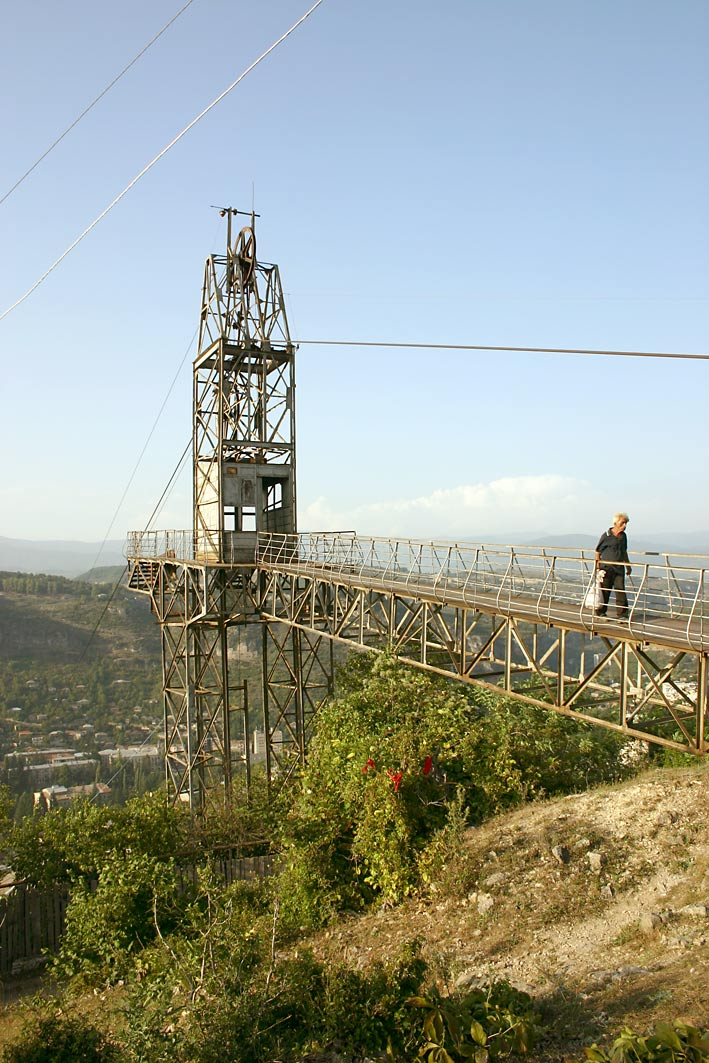 ჭიათურა = Tschiatura - Seilbahnstation